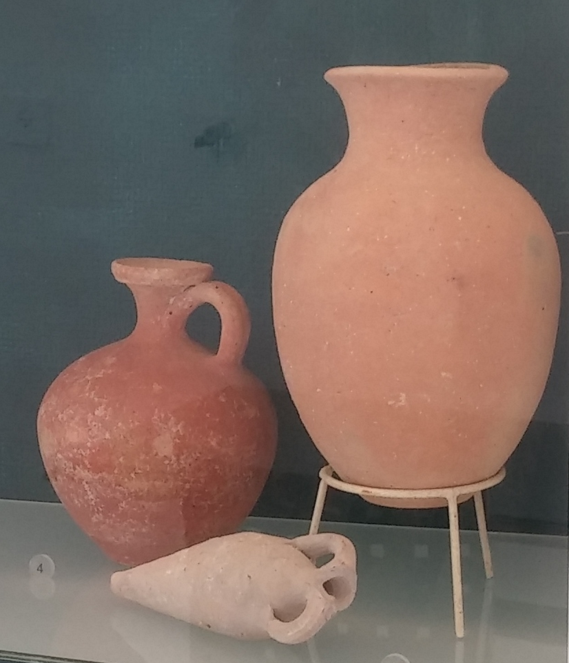 בלי בית: קנקן ופך מחרס תקופת הברונזה התיכונה (1550-2000 לפנה"ס) תל ועין זריק (וקנקנית משמאל מחרס מהתקופה ההלניסטית (63-332 לפנה"ס